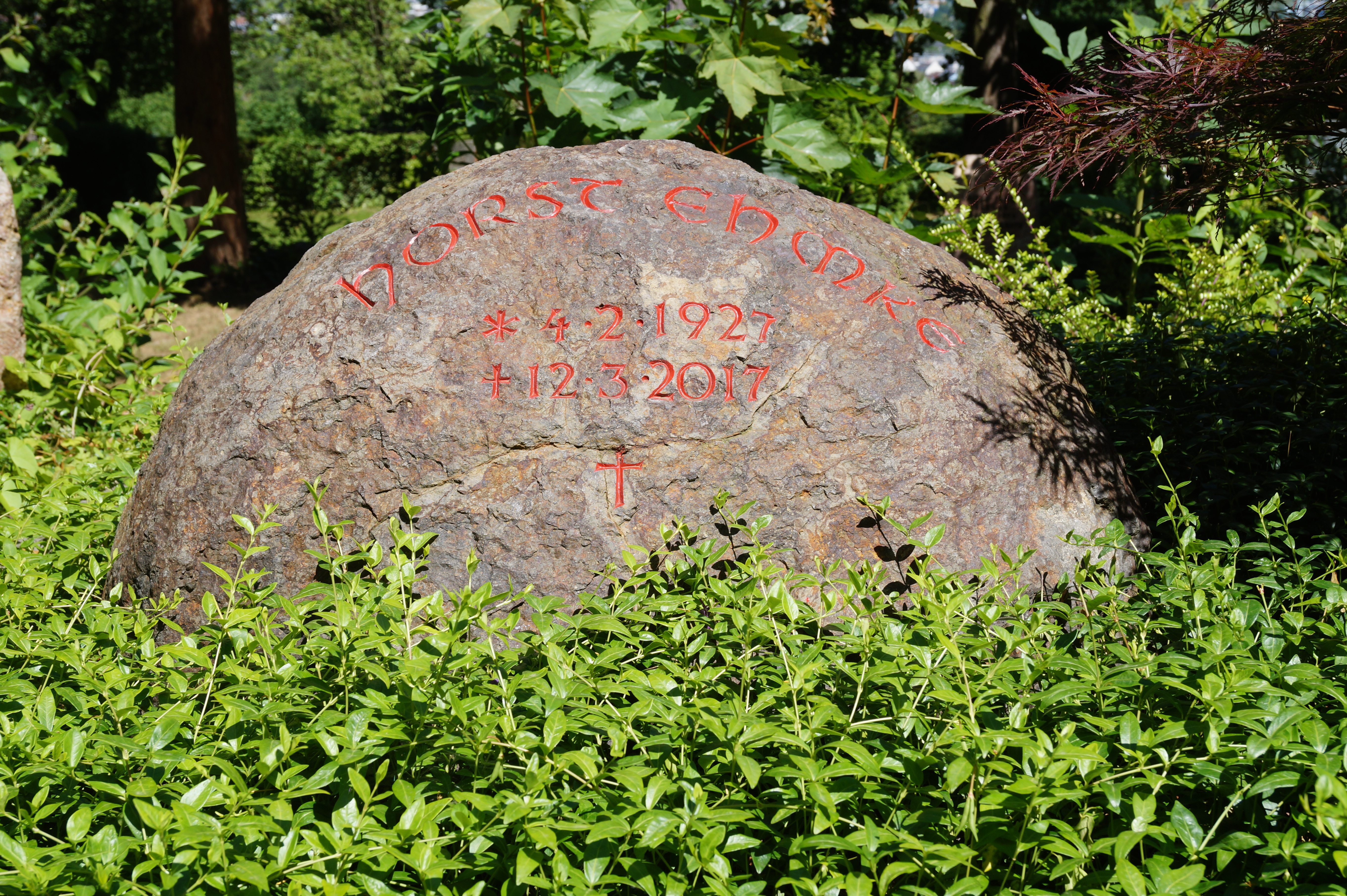 Grabstein von Horst Ehmke auf dem Poppelsdorfer Friedhof (Abteilung XXVIII).